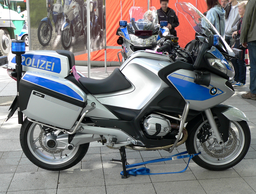 Polizeimotorrad Niedersachsen, Fotoaufnahme bei Veranstaltung "Polizei erleben" am 04./05.09.10 in Hannover auf dem Ernst-August-Platz